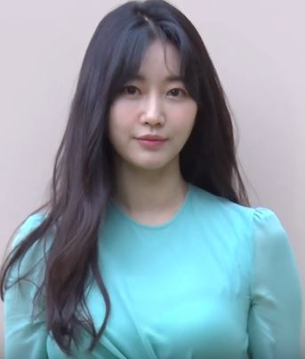 배우 김사랑이 9일 오후 서울 강남구 청담동 한 브랜드 매장에서 열린 슈즈 브랜드 디자이너 방한 기념 포토 이벤트 행사에 참석했다.